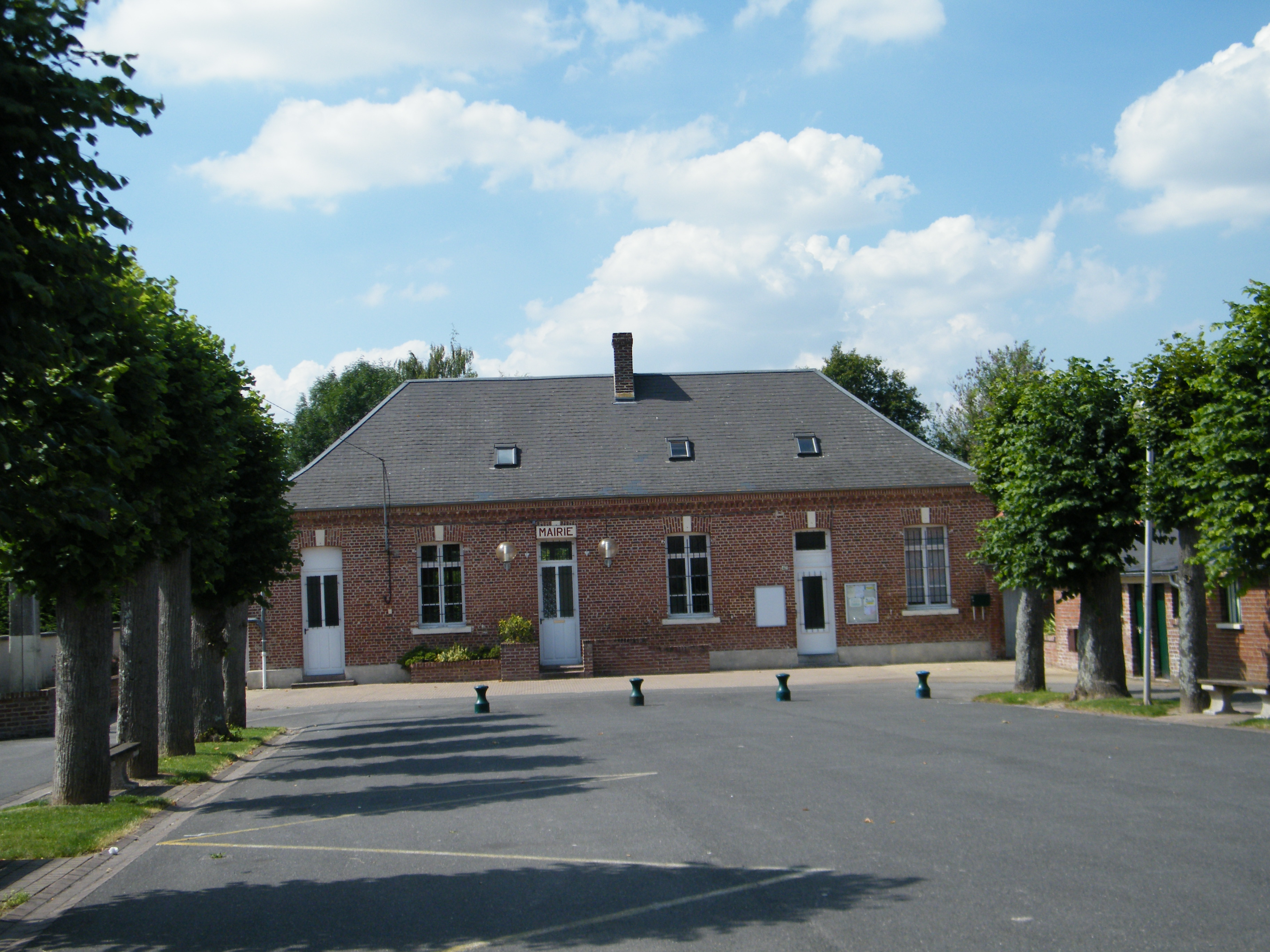 Mairie.